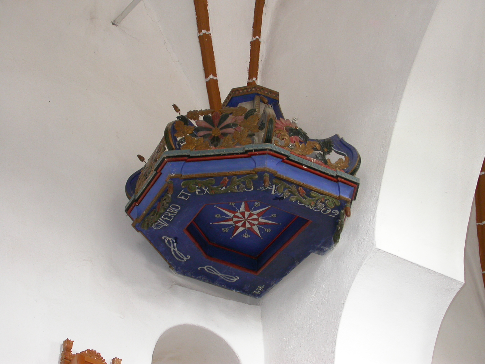 Ansamblul bisericii unitariene, sec. XIV - XVI